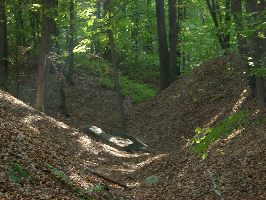 Głazy narzutowe w rezerwacie przyrody "Parowy Janinowskie" Erratic boulders in nature reserve "Janinów Ravines" author: Bogdan Janus, Łódź, Poland